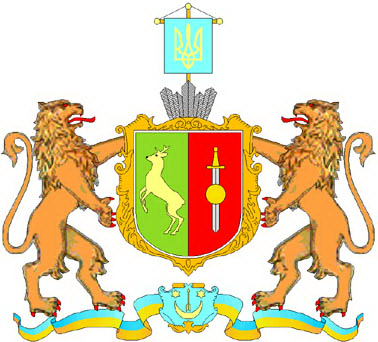 Герб Старосамбірського району